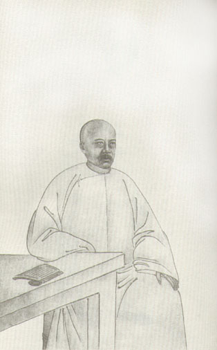 嚴復，清朝學者。YAN Fu